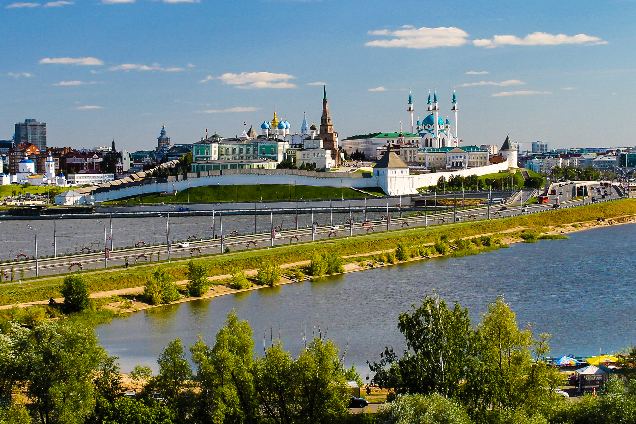 Ансамбль Казанского Кремля (Государственный историко-архитектурный и художественный музей-заповедник "Казанский Кремль"): Кремль, Казань, Татарстан